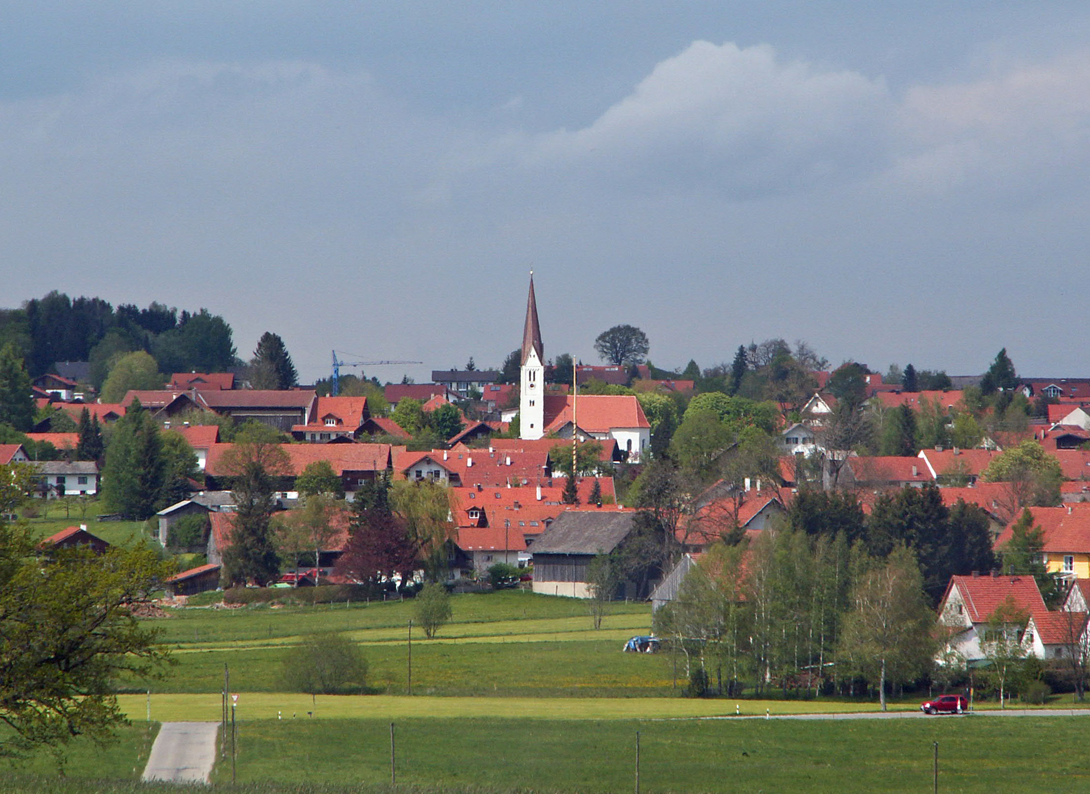 Rott von Süden